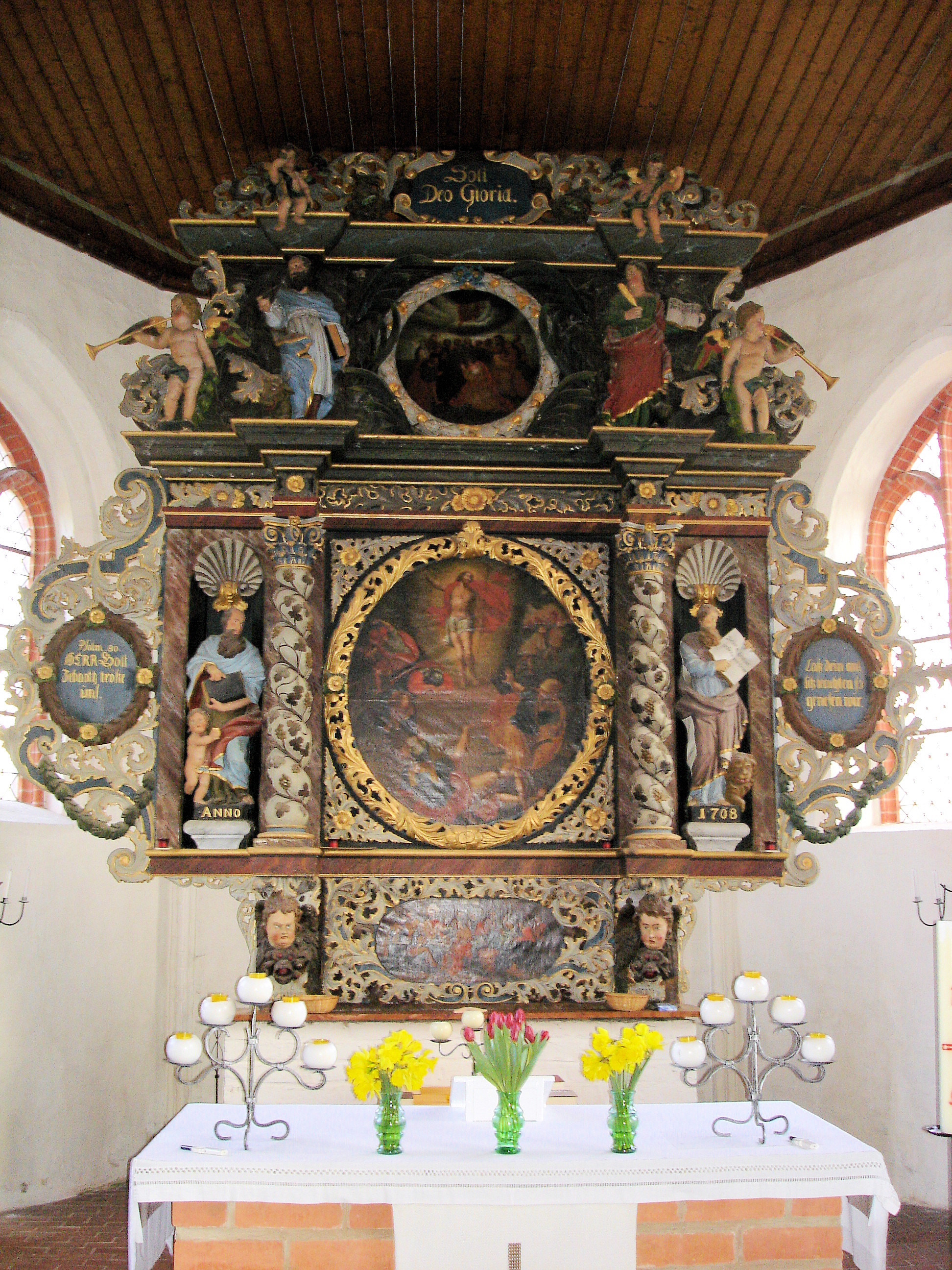 Kirche Rövershagen, Altar/ Church in Rövershagen, altar